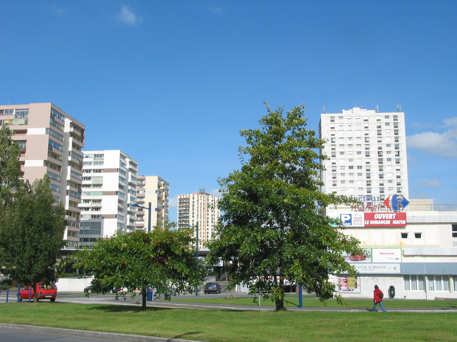 Avenue de Tarente du quartier de Bellevue à Brest, France